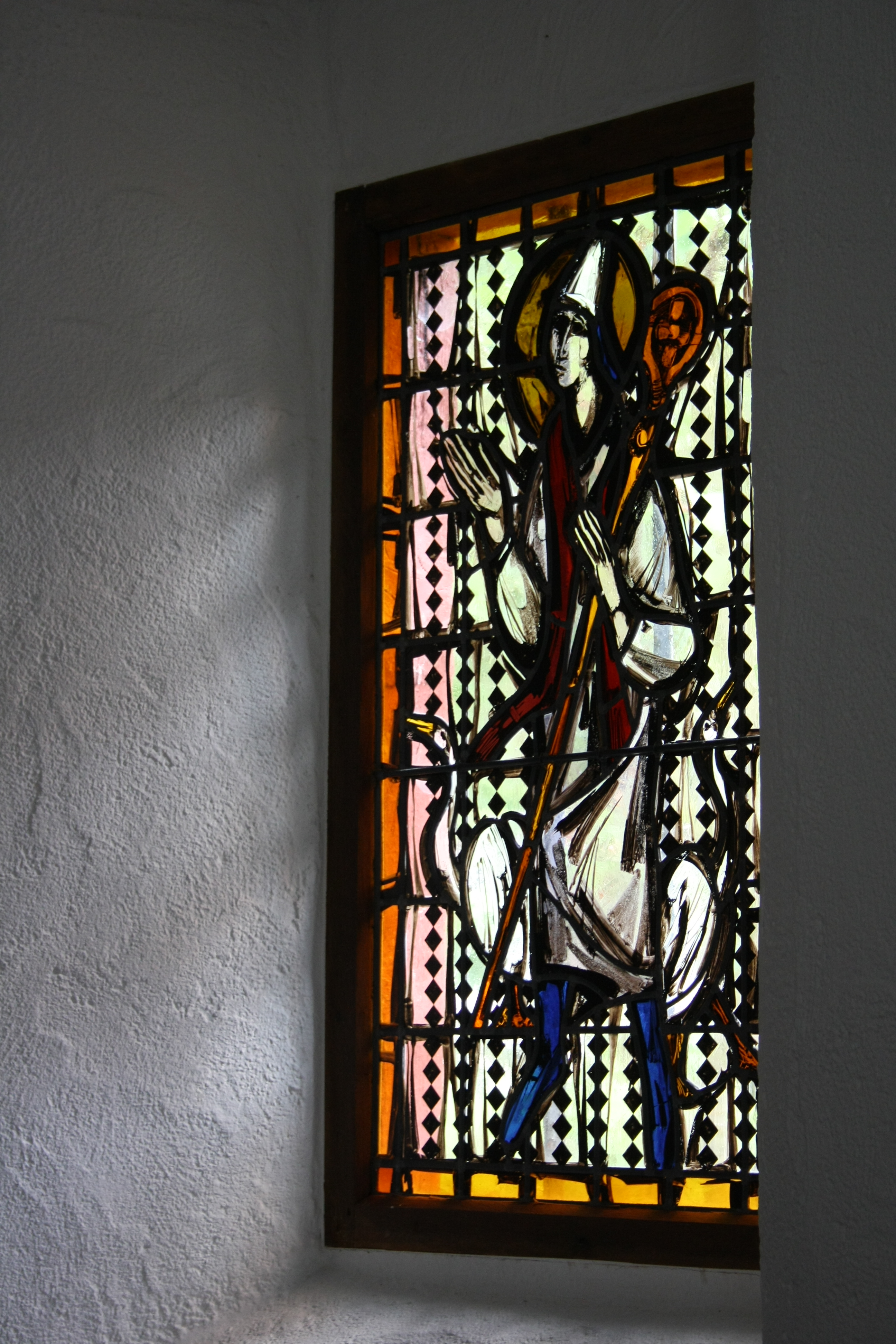 Bleiglasfenster der katholischen Kapelle St. Agatha und Lutger in Lückenbach, einem Ortsteil von Dümpelfeld; Darstellung: hl. Lutger